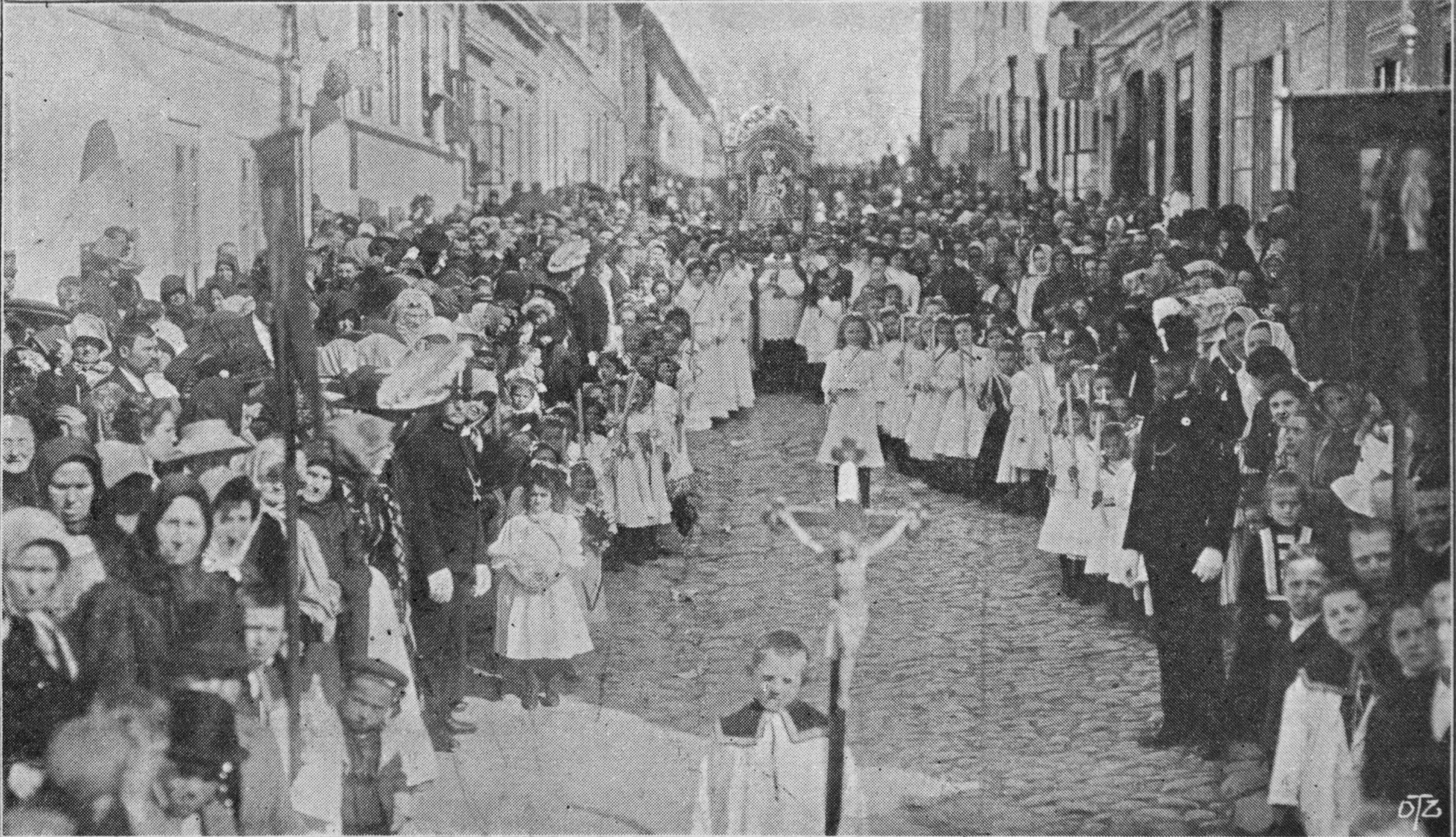 Procesija u Petrovaradinu 1881. godine sa slikom Majke božje Snježne . Tekijske